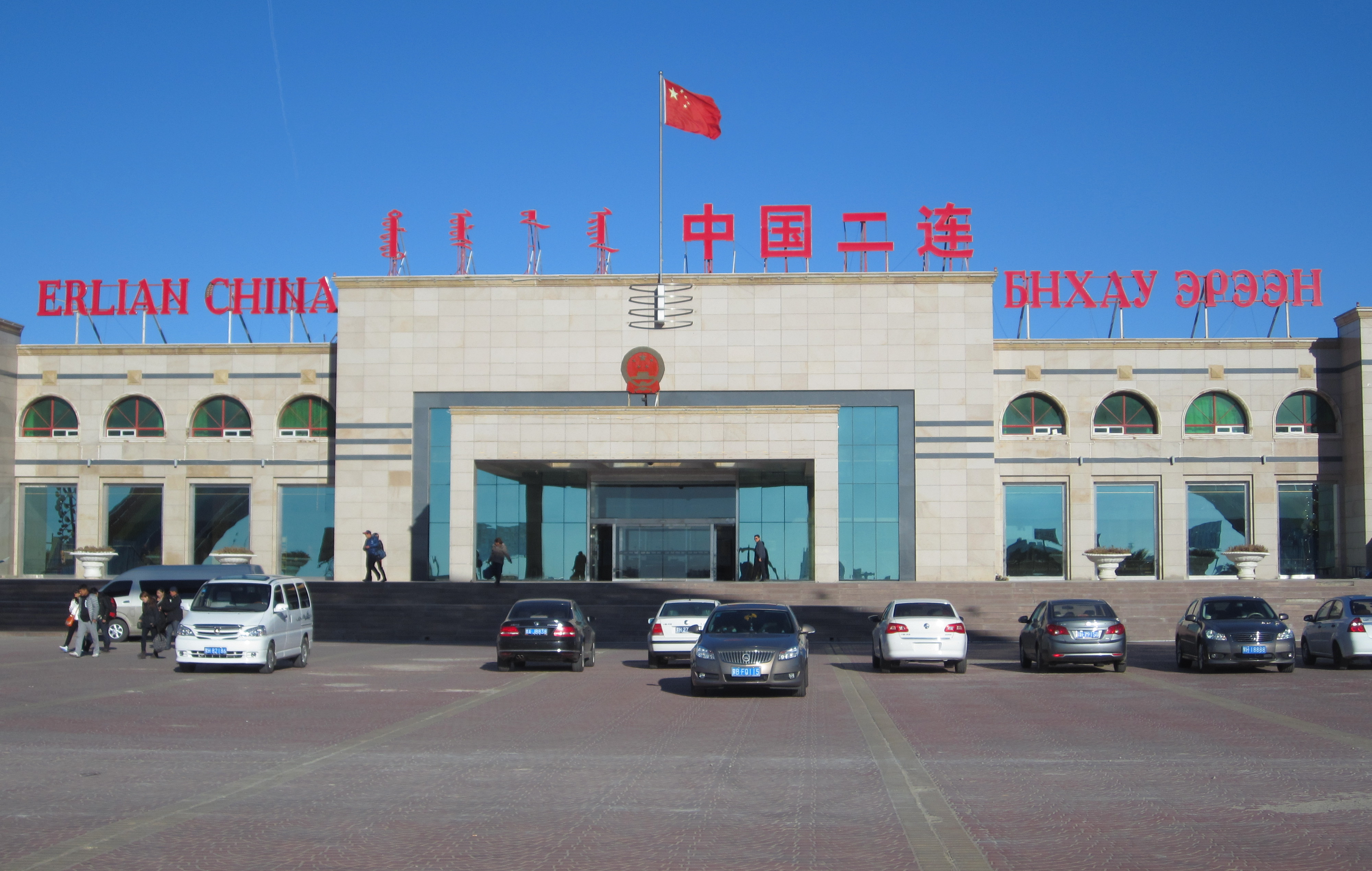 Erenhot port, 二连浩特口岸